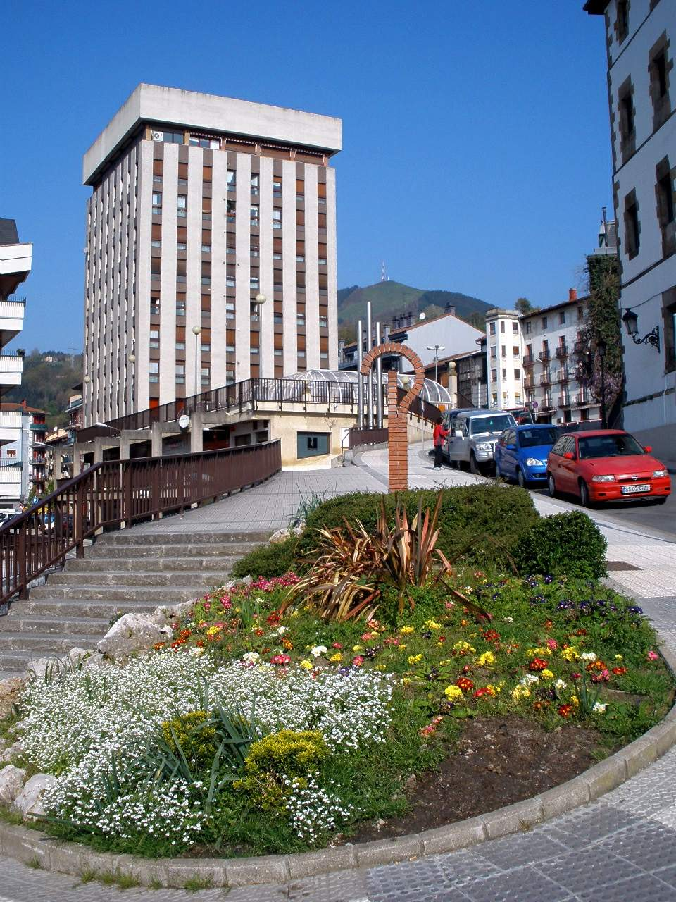 Ordizia, Guipúzcoa